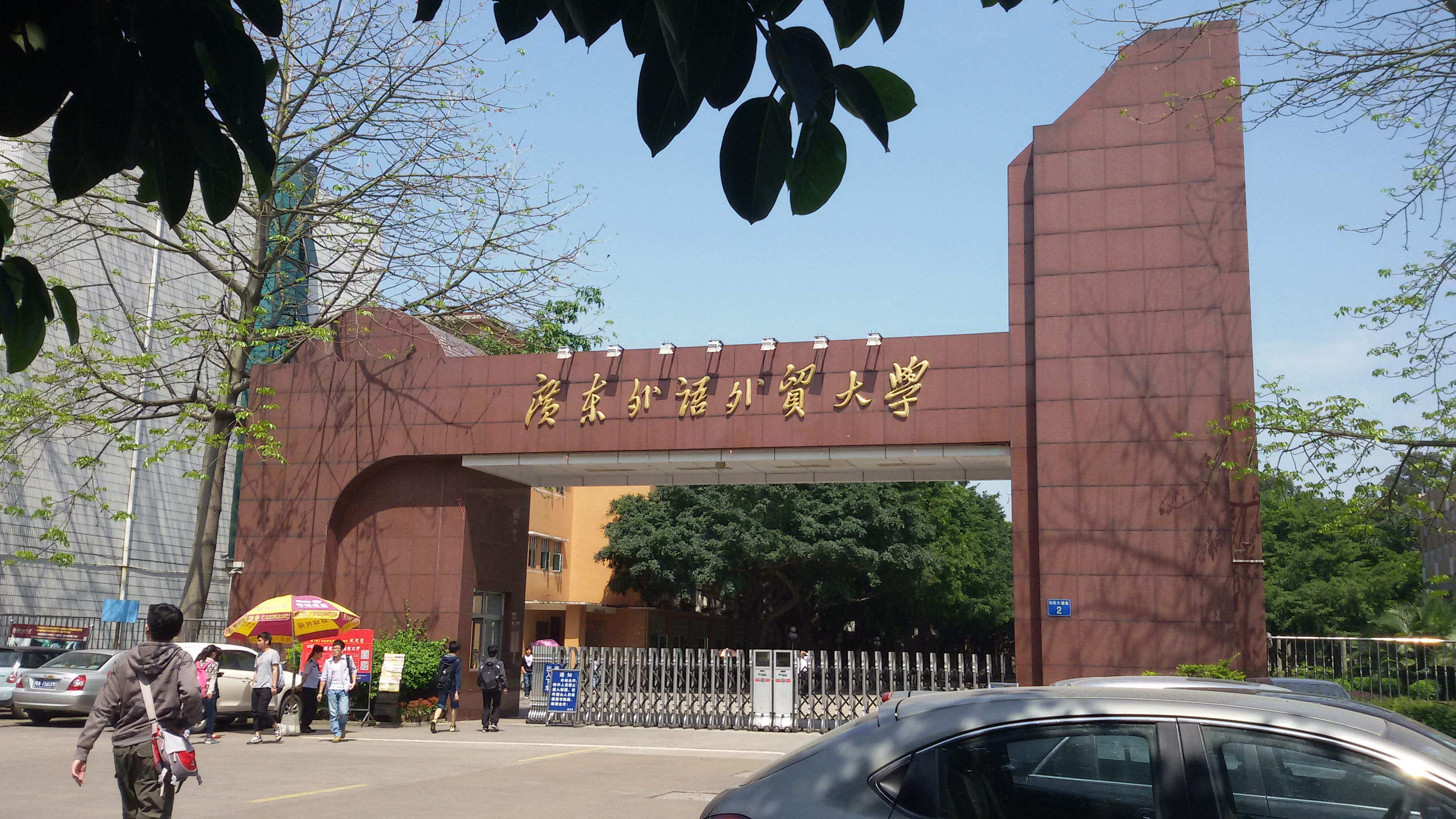 粵語: 廣東外語外貿大學嘅北校區正門